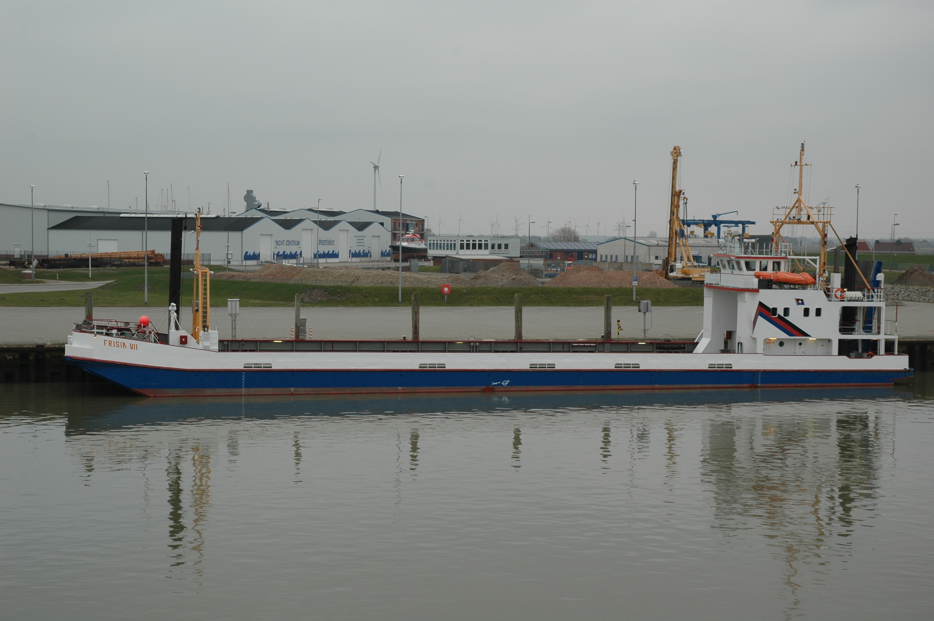 Frachtfähre Frisia VII im Hafen von Norddeich.